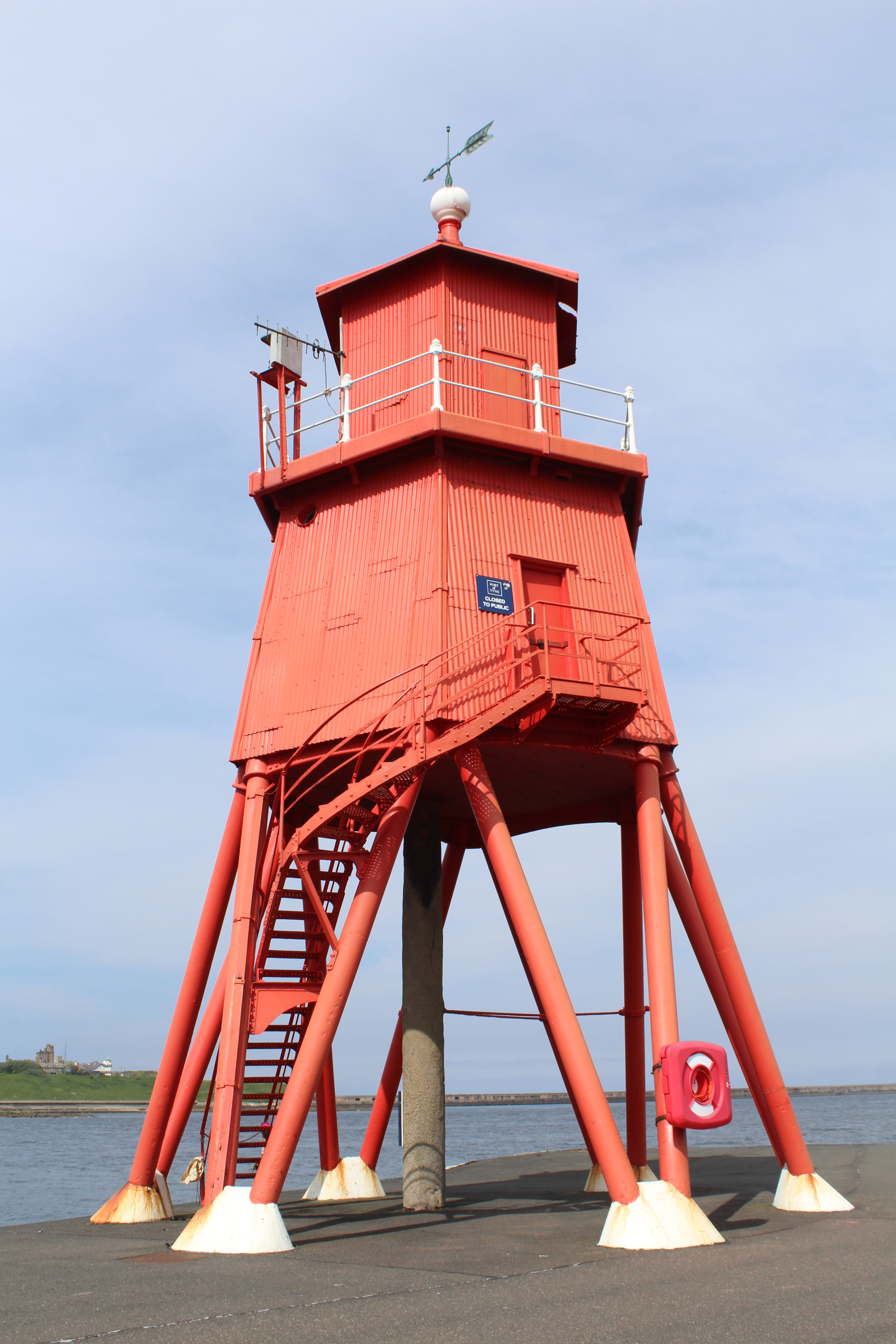 Phare Herd Groyne, South Shields, South Tyneside.